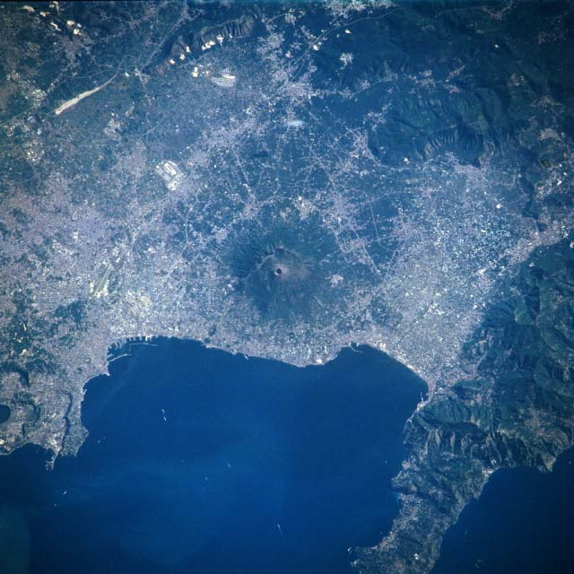 La conurbazione Vesuviana, immagine Nasa, destinata alla pagina Provincia di Napoli